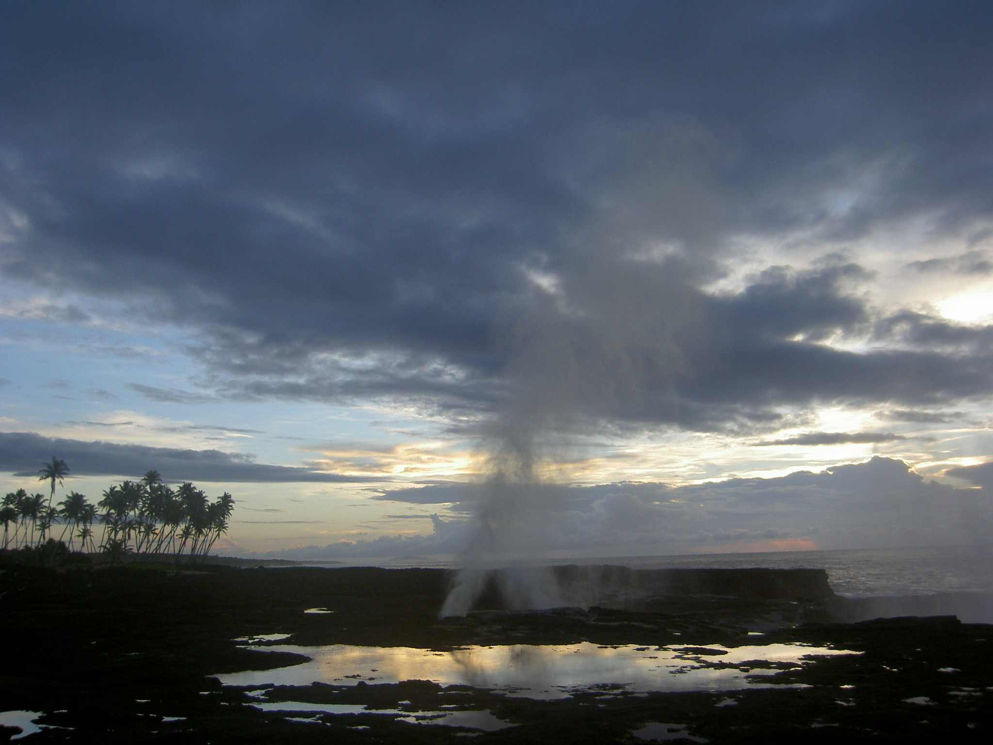 Die Blowholes von Taga auf Samoa (Savai'i) Selbst aufgenommen im Januar 2005 --Plenz 13:32, 9 December 2006 (UTC)